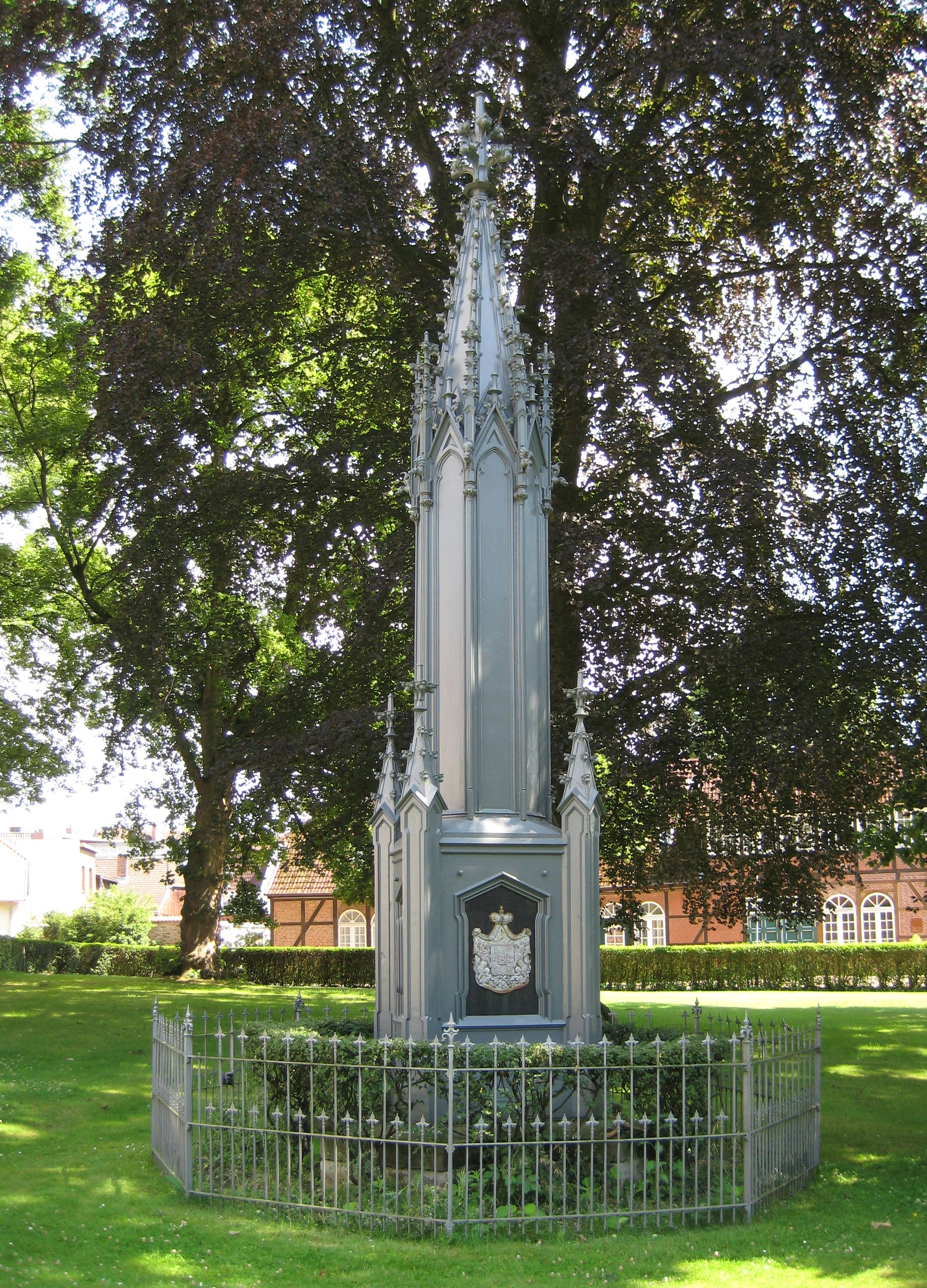 Itzehoe, im Klosterhof: "Dem Andenken der Prinzessin Juliane zu Hessen, Aebtissin, die dankbare Stadt. Sie war geboren auf Gottorf den 19. Januar 1773, ward Aebtissin des hiesigen Klosters den 23. Mai 1810 und starb den 11. März 1860."